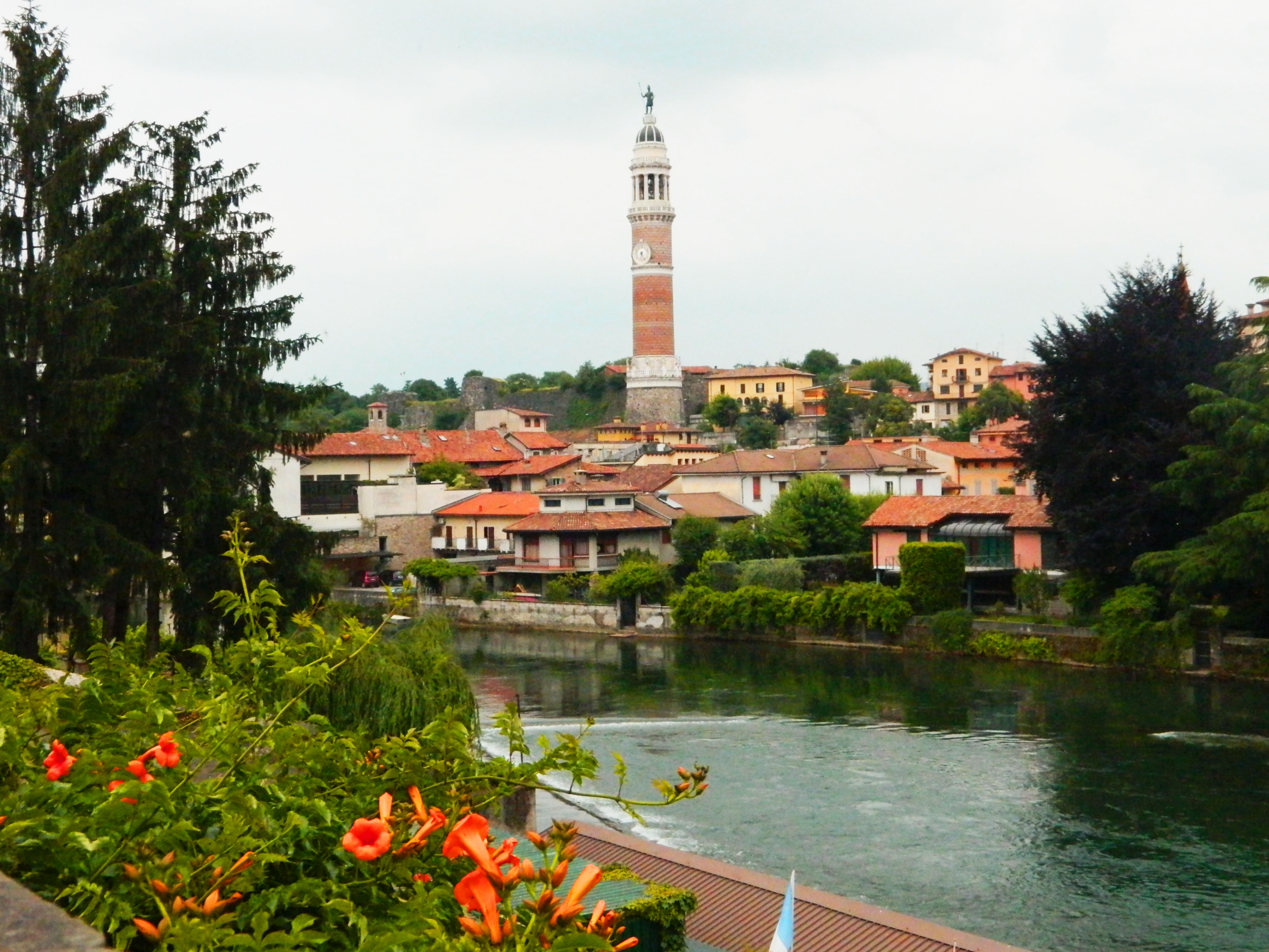 Veduta di Palazzolo sull'Oglio dalla riva di Mura